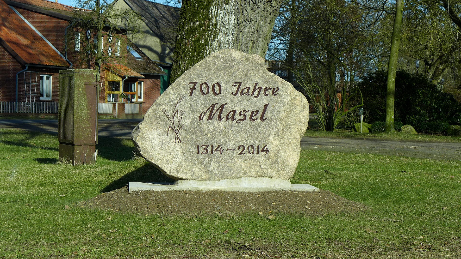 700 Jahre Masel bei Sprakensehl.